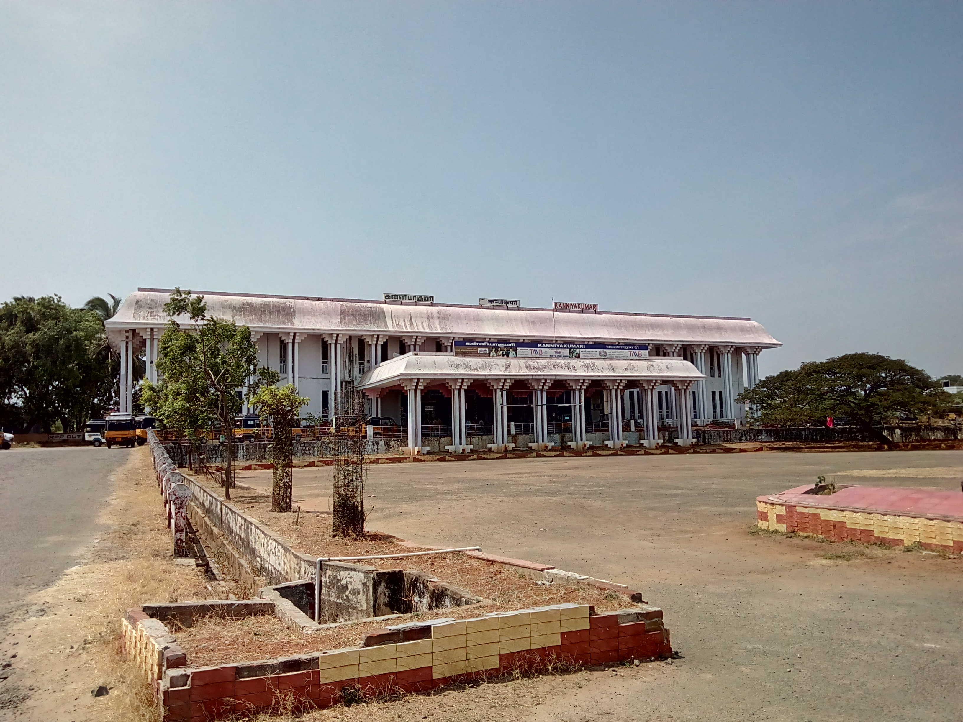 Kanyakumari Station